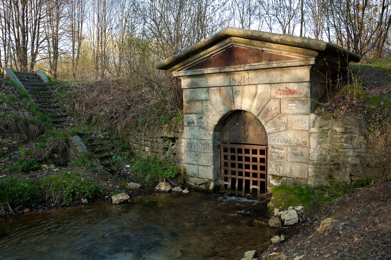 Wylot Sztolni Czarnego Pstrąga. Gmina Zbrosławice, Województwo Śląskie, Polska.